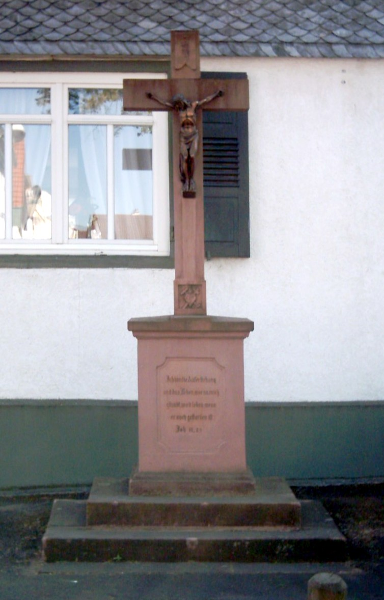 Steinkreuz in der Bieberer Oberhofstraße. Bis im 19. Jahrhundert stand es an der Stelle, wo die Schöffen der Biebermark ihr jährliches Märkerding abhielten.